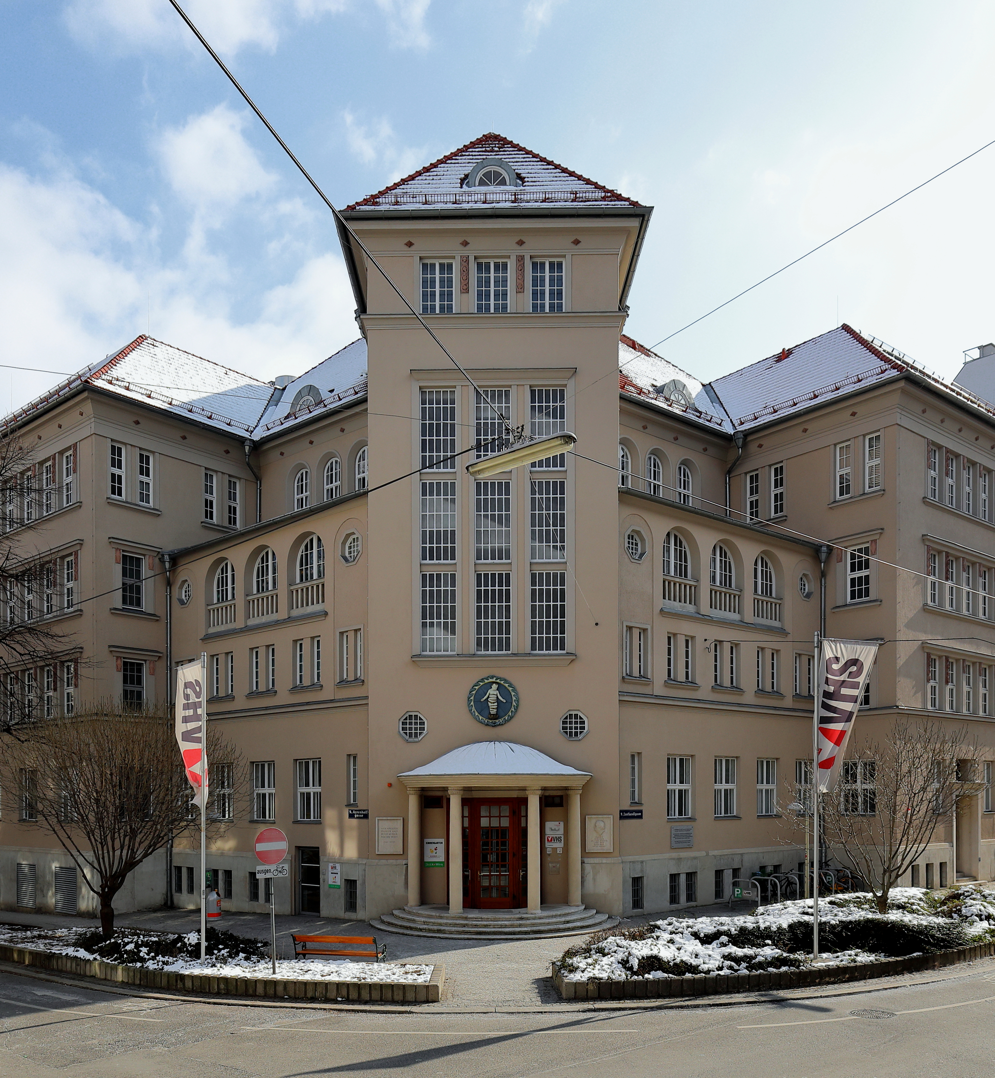 Das Julius-Tandler-Familienzentrum an der Ecke Lustkandlgasse/Ayrenhoffgasse im 9. Wiener Gemeindebezirk Alsergrund.Der L-förmige Eckbau in Heimatstilformen wurde ab 1923 auf Initiative von Stadtrat Julius Tandler nach Plänen von Adolf Stöckl errichtet und am 18. Juni 1925 als Kinderübernahmestelle der Stadt Wien eröffnet. Ab 1964 erfolgte ein Umbau sowie eine Renovierung des Gebäudes und am 22. November 1965 die Eröffnung als Julius-Tandler-Heim.